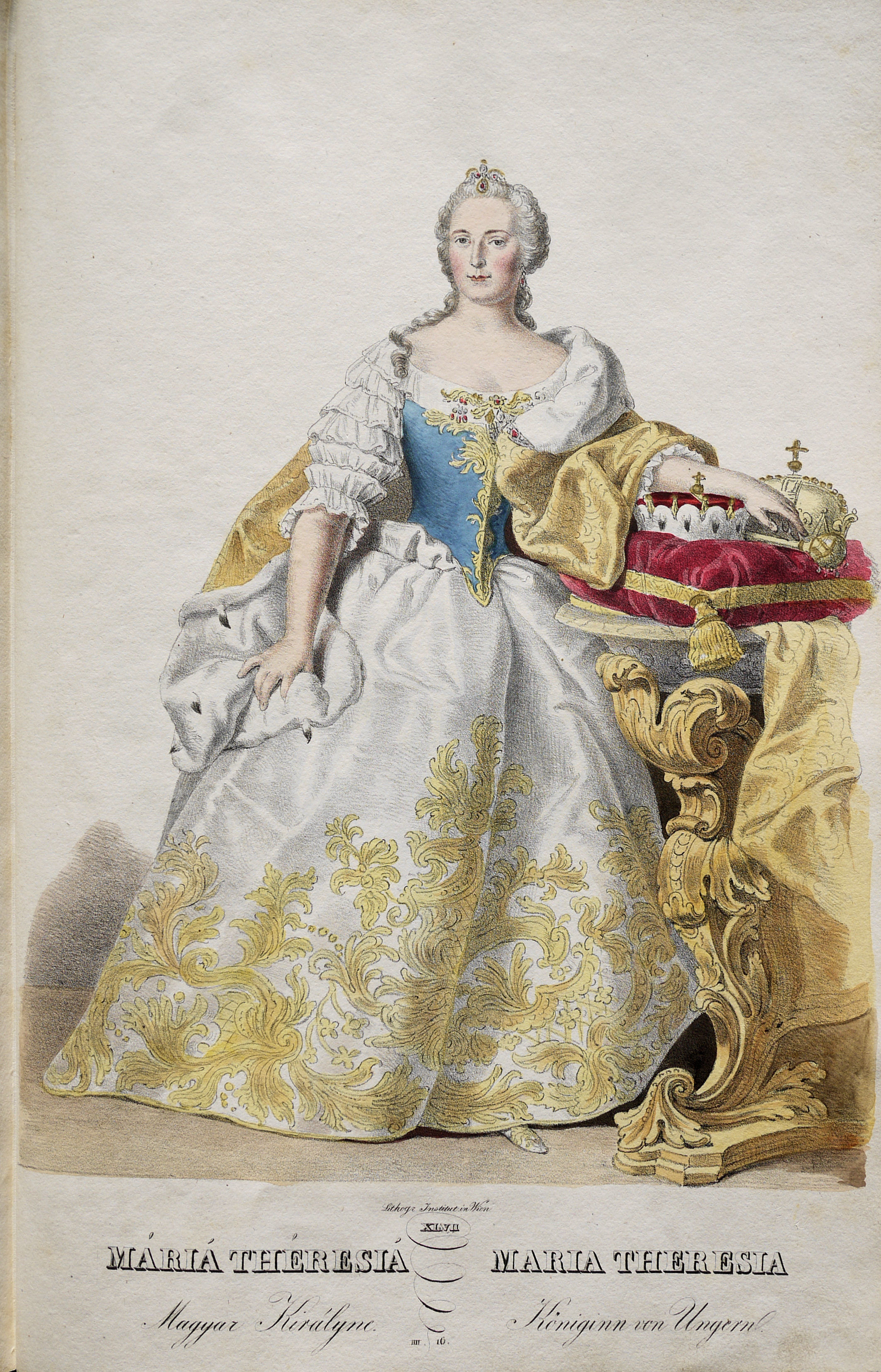 Maria Theresia(1717-1780), Erzherzogin von Österreeich, Königin von Böhmen und Ungarn, etc. Lithographie von Josef Kriehuber nach einer Zeichnung von Moritz von Schwind aus Ungerns Erste Heerführer Herzoge und Koenige In einer Reihe von Bildnissen von Bela bis auf Seine Majestät Franz I. Kaiser Von Österreich König Von Ungern &c., &c. Wien : Lithographisches Institut ;ca. 1828.